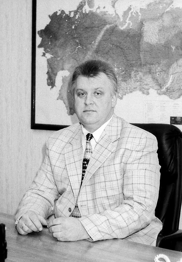 Сергей Валентинович Кирьянов (1.09.1959, Переславль) — инженер-строитель, окончил Московский институт инженеров железнодорожного транспорта (1982), мастер ремонтно-строительного цеха фабрики «Красное эхо», заместитель директора по капитальному строительству (1982—1997), генеральный директор ОАО «Залесье» (с 1997). Депутат городской думы 3 созыва (2000—2004), член партии «Единая Россия» (с 2003). Награждён медалью ордена «За заслуги перед Отечеством II степени» (2000).